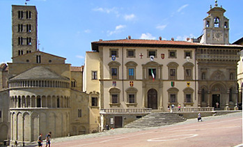 Nella foto sono visibili Piazza Grande (la piazza inclinata in primo piano), il retro e il campanile della chiesa di Santa Maria della Pieve (a sinistra), il Palazzo dei Tribunali (l'edificio chiaro al centro) e la Fraternita dei Laici (l'edificio più scuro a destra)